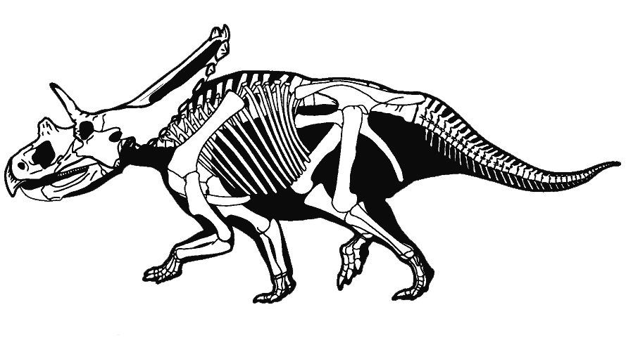 Mojoceratops skeletal restoration.